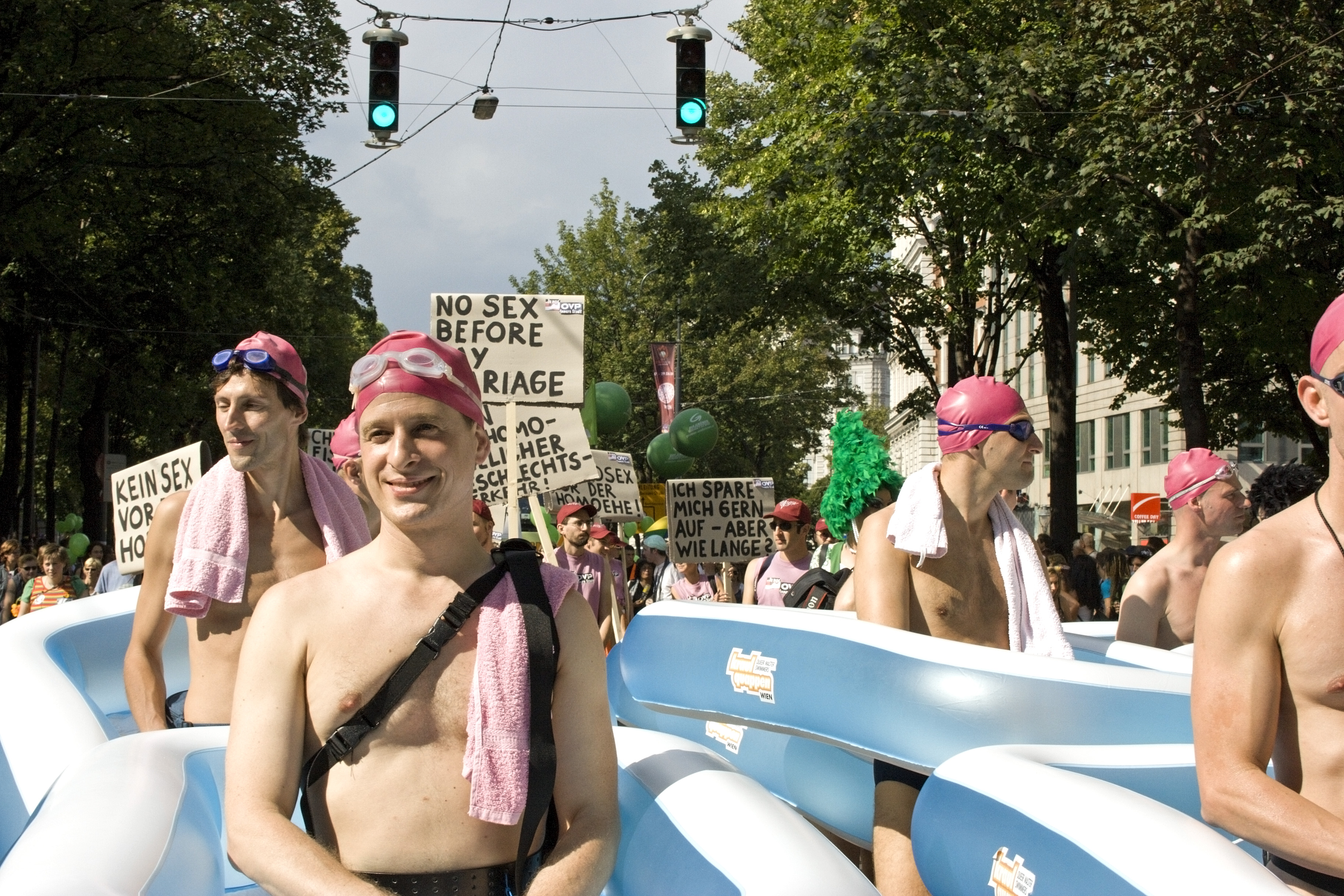 Regenbogenparade 2007, Vienna - Swimming group "Kraulquappen"